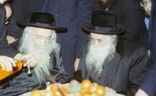 רבי משולם זוסיא עם הרבי מקלויזנבורג